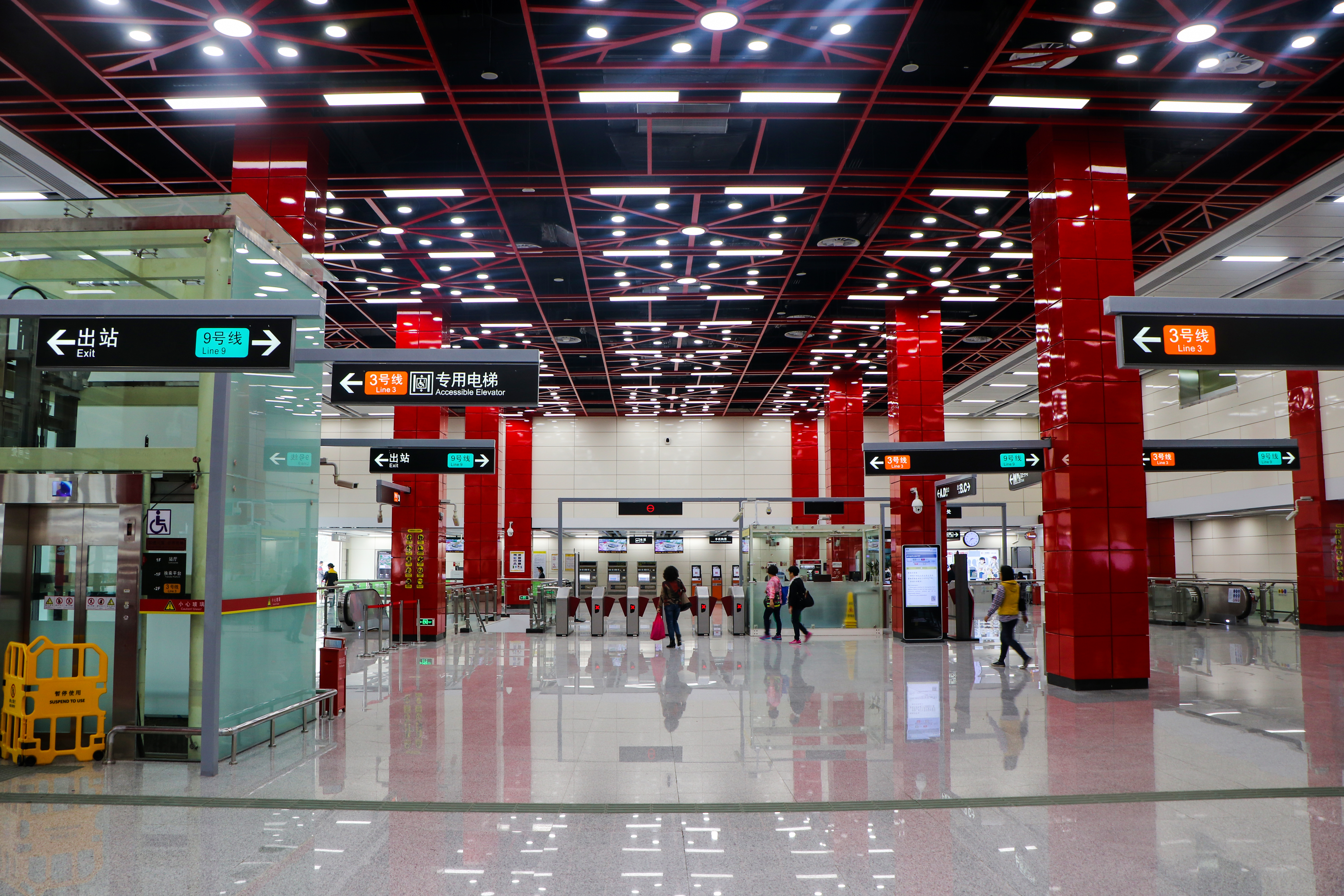 广州地铁高增站